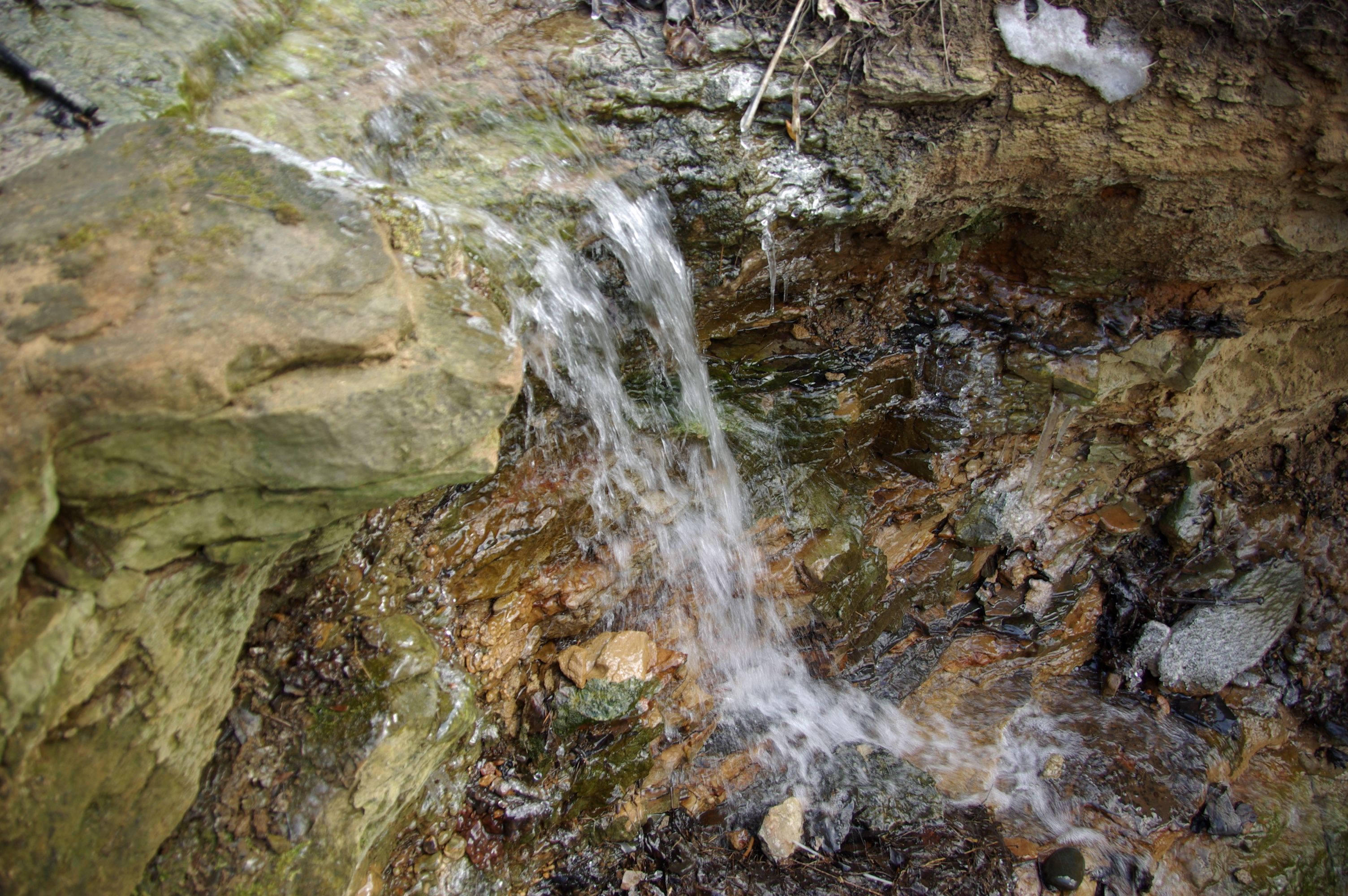 asub Tallinna linnas, Kadrioru pargi territooriumil, Hundikuristiku kanjonis